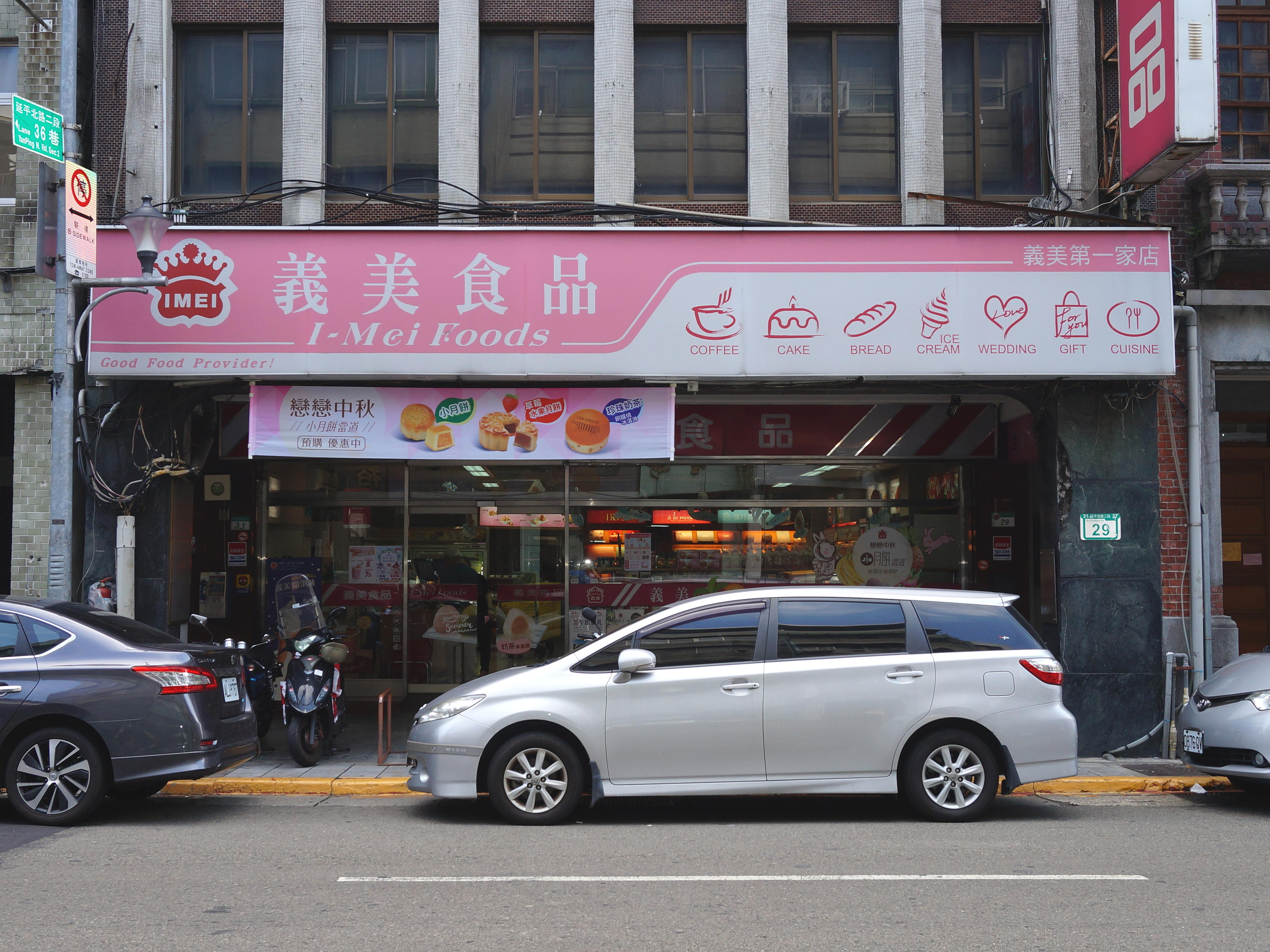 義美食品延平門市，地址：臺北市大同區延平北路二段29號1樓。